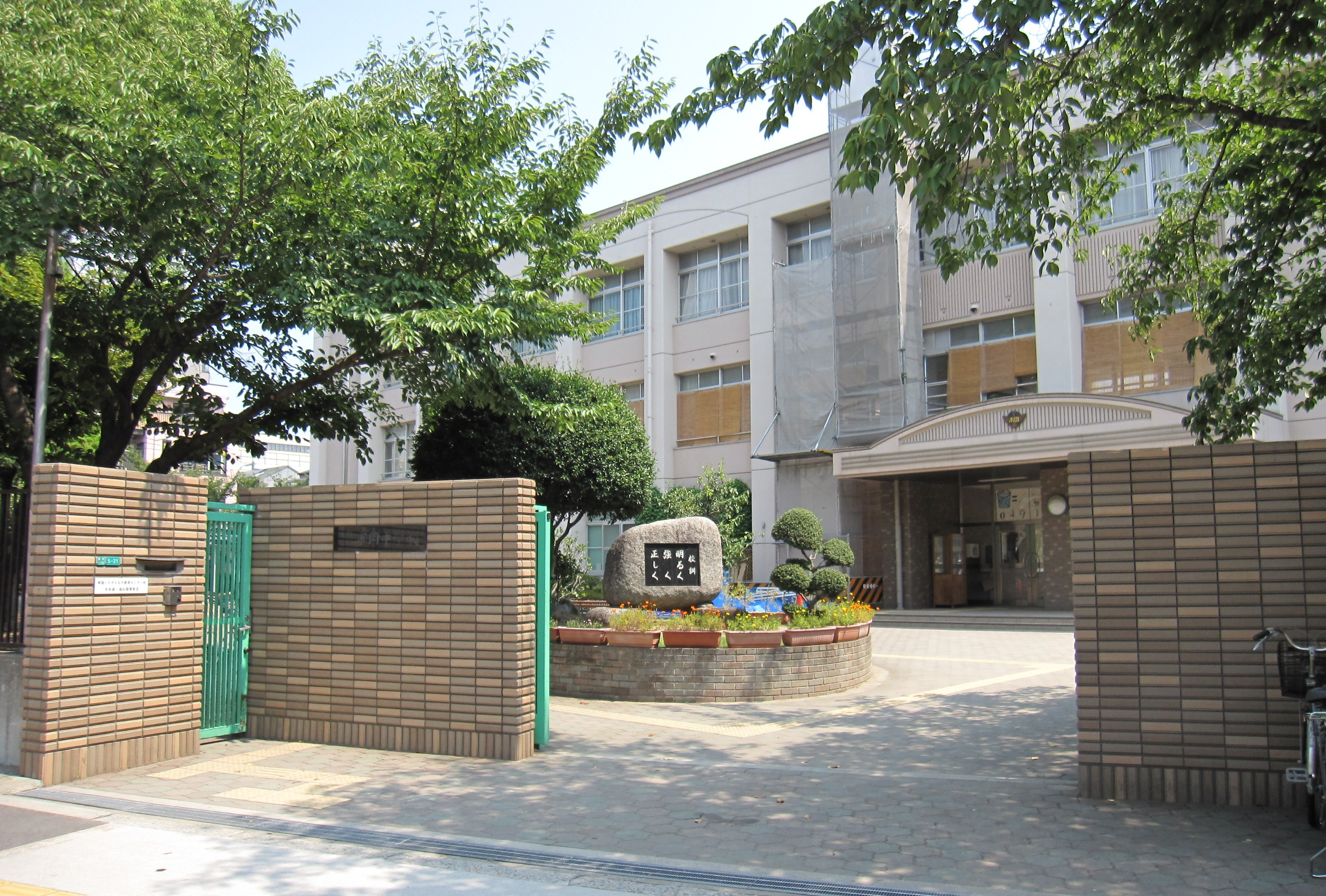 大阪市立市岡中学校